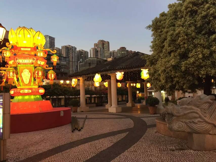 Der alte Marktplatz von Taipa, Macau